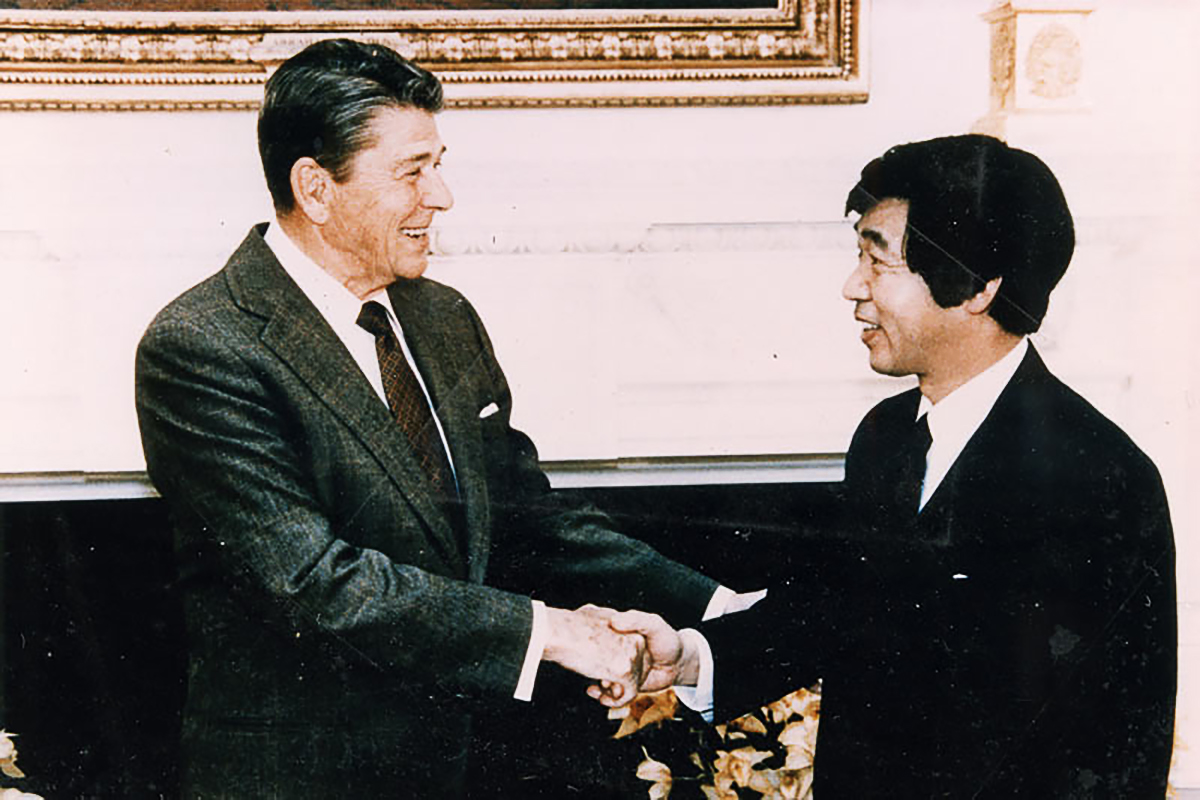 Toyohiro Akiyama